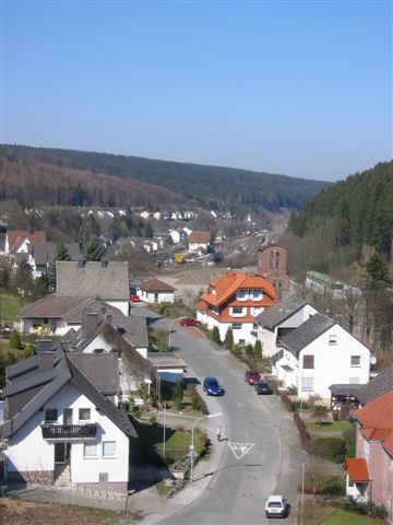 Brilon-Wald im Hochsauerlandkreis; Blick über das Dorf vom Kirchturm aus. Im Hintergrund rechts das ehemalige Industriegebiet mit dem Essigturm